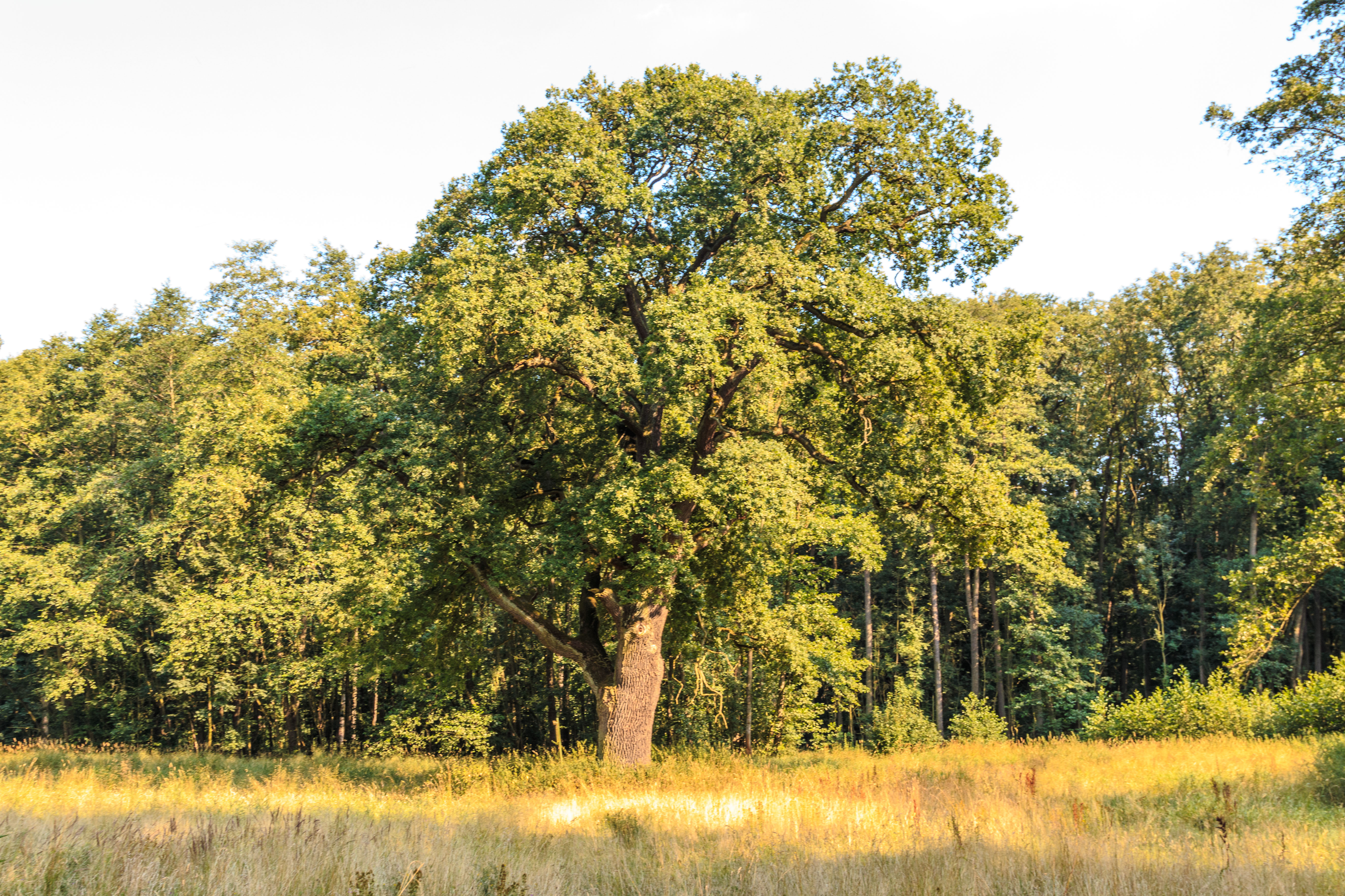 Přírodní rezervace Myslivna Project: Chráněná území.